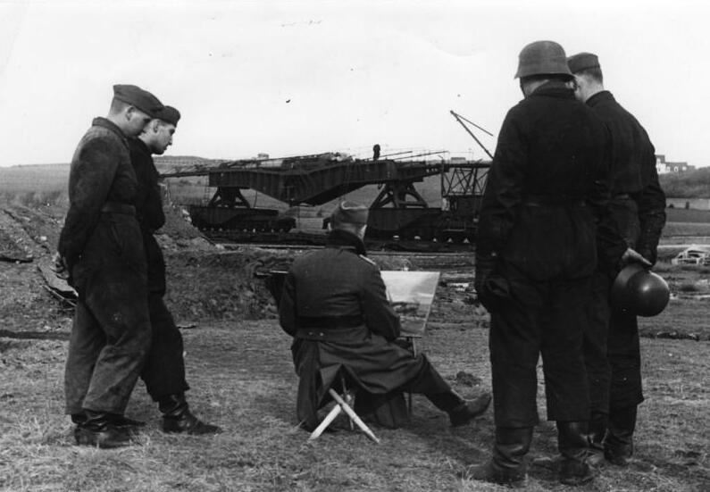 Prop.-Kp. 612 Bildberichter: Trautvetter; Text: Trautvetter Ort: Boulogne; Datum: 10.2.41 Text: Fernkampfgeschütze beschiessen Südostengland. Interssiert begutachten die Männer die Arbeit eines PK-Kriegsmalers.